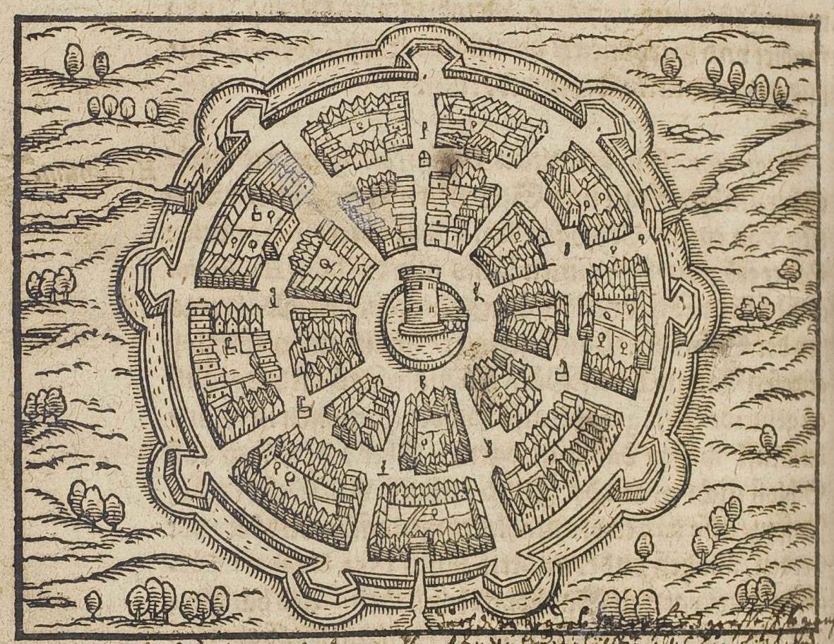 from: Abraham Saur: Theatrum Urbium. Warhafftige Contrafeytung/ und Summarische Beschreibung/ fast aller vornemen und namhafftigen Stätten/ Schlössern und Klöster ..., Frankfurt : Richter, 1610 (Erstausgabe: 1593)